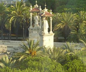 San Pascual Bailón en el puente del Mar de Valencia